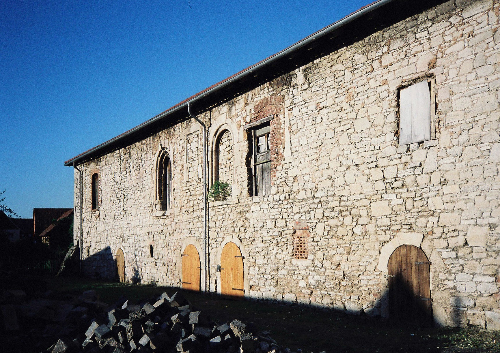 Steinernes Haus (2000)